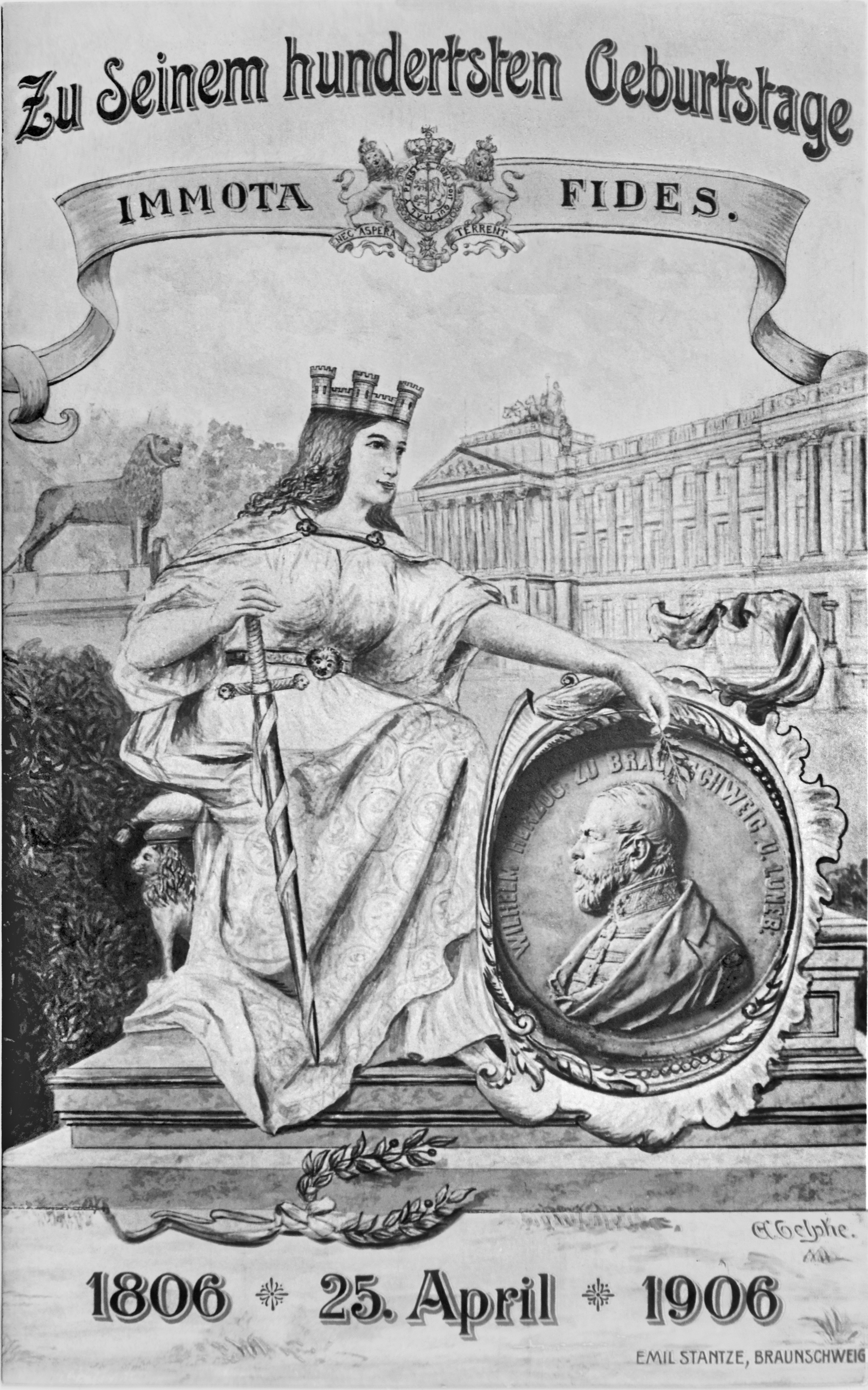 Ansichtskarte von 1906, zum 100. Geburtstag Wilhelms von Braunschweig-Lüneburg